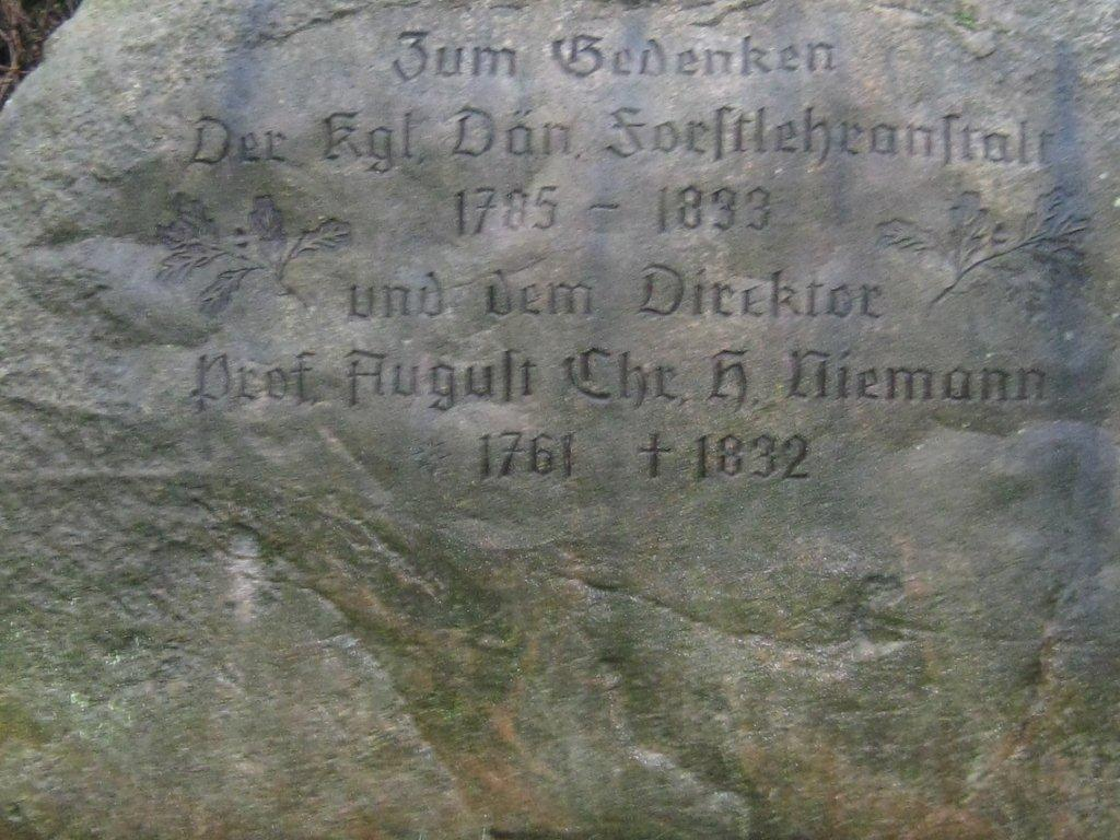 Gedenkstein für August Christian Niemann im Park der Forstbaumschule Kiel